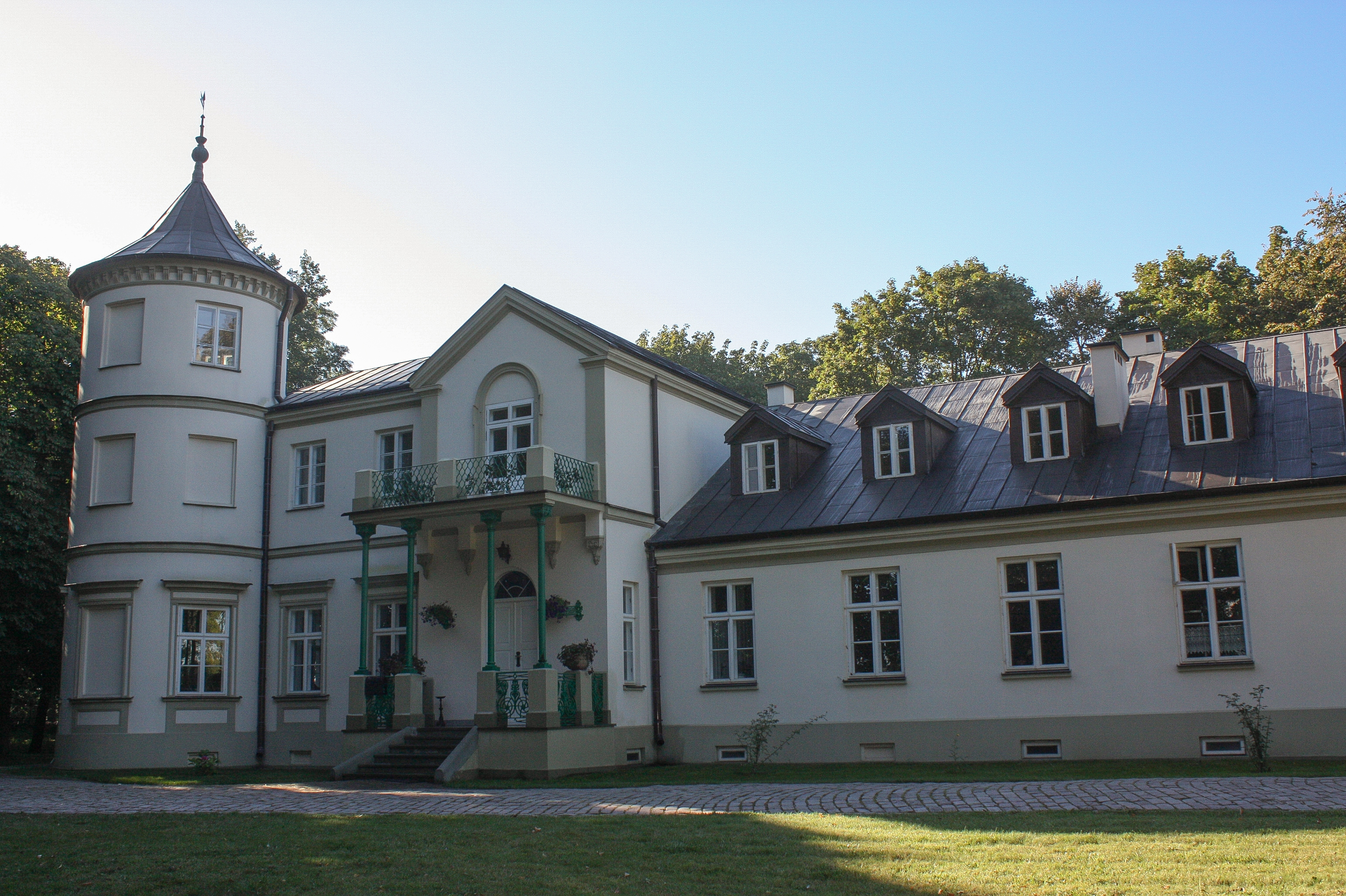 Zielonki-Parcela, pałac, 1855